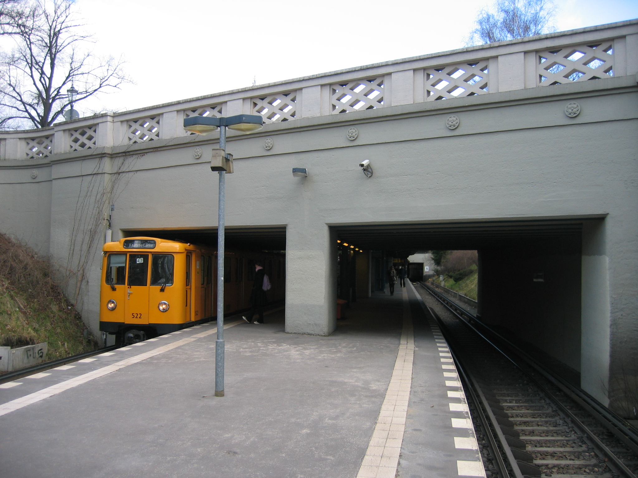 U-Bahnhof Dahlem-Dorf, Berlin. Fabeckstraßenbrücke am südwestlichen Bahnhofzugang.